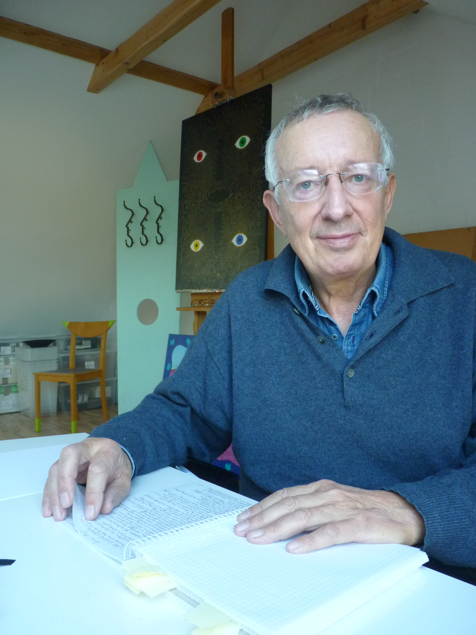 Glaskünstler aus Hamburg.